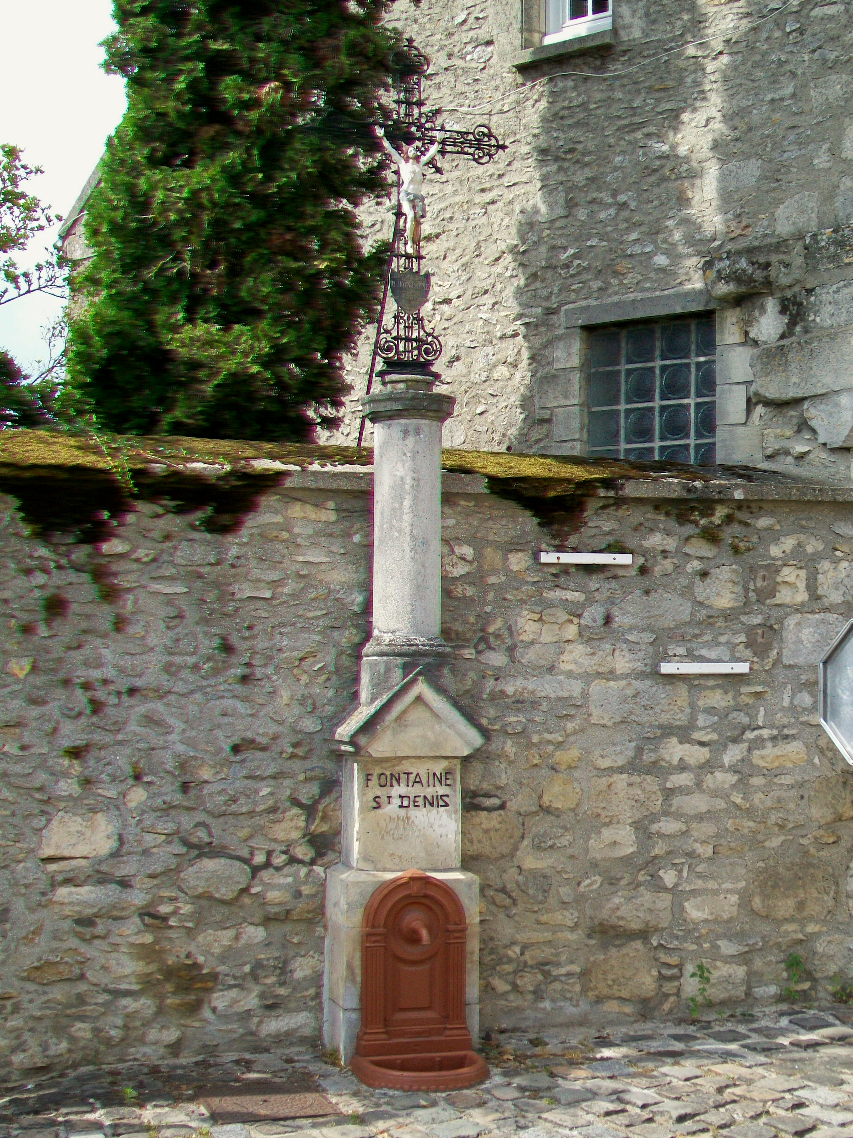 La fontaine Saint-Denis, à l'angle des rues Paul-Faure et Fontaine-Saint-Denis.